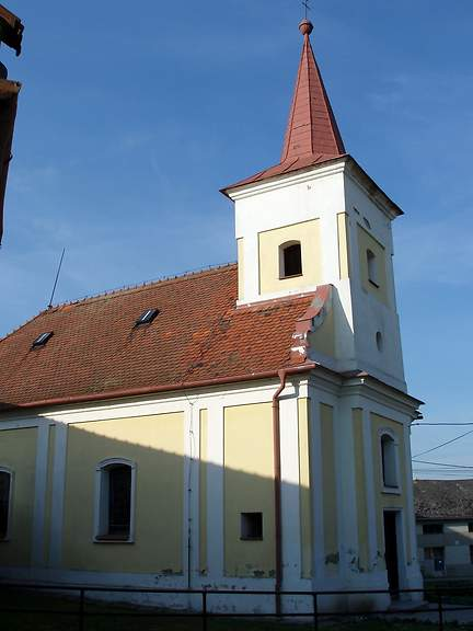 Kostel sv. Markéty (Biskupice), Biskupice